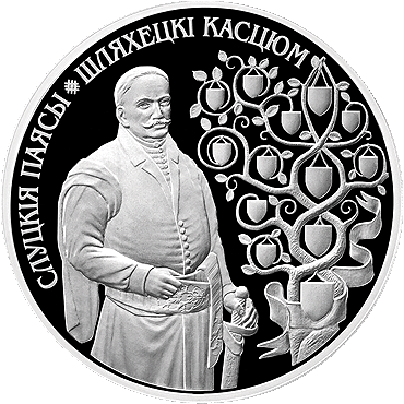 Беларуская (тарашкевіца): Памятная манэта «Слуцкія паясы (Słuckija pajasy). Шляхецкі касьцюм»